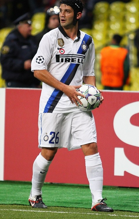 Cristian Chivu durante CSKA Mosca-Inter del 27-11-2011